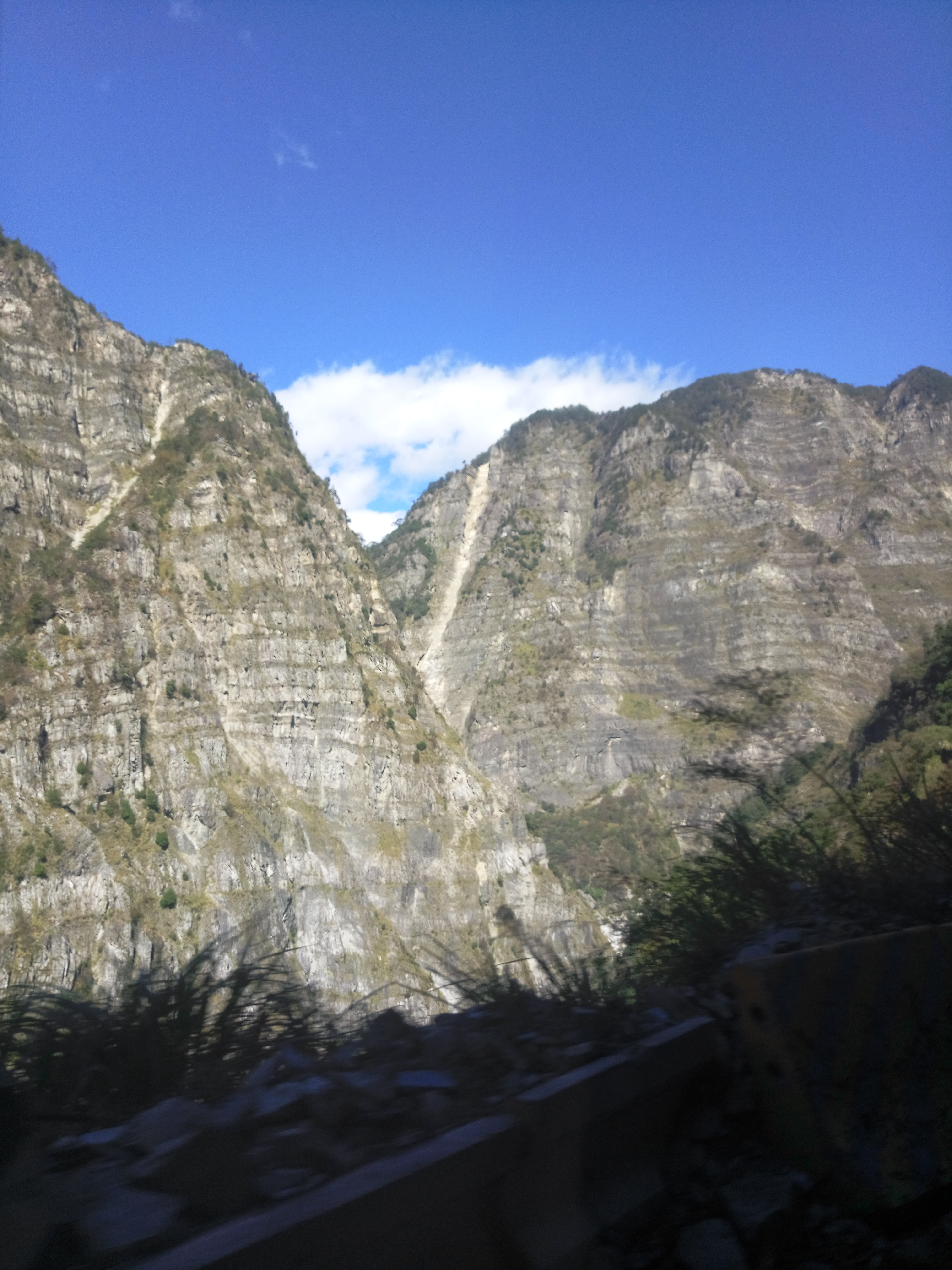 臺灣臺中市和平區中橫便到登仙峽